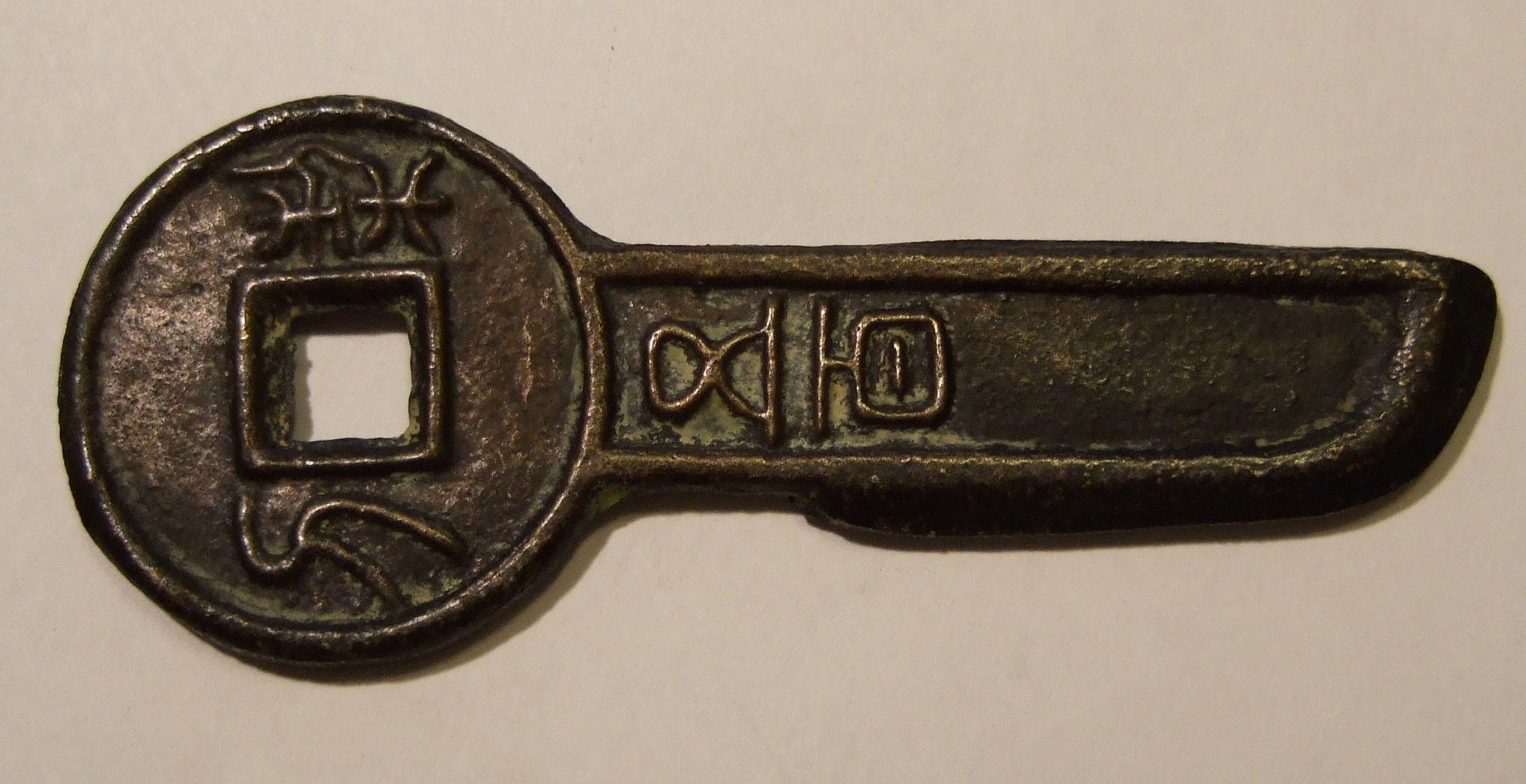 Ancient script.